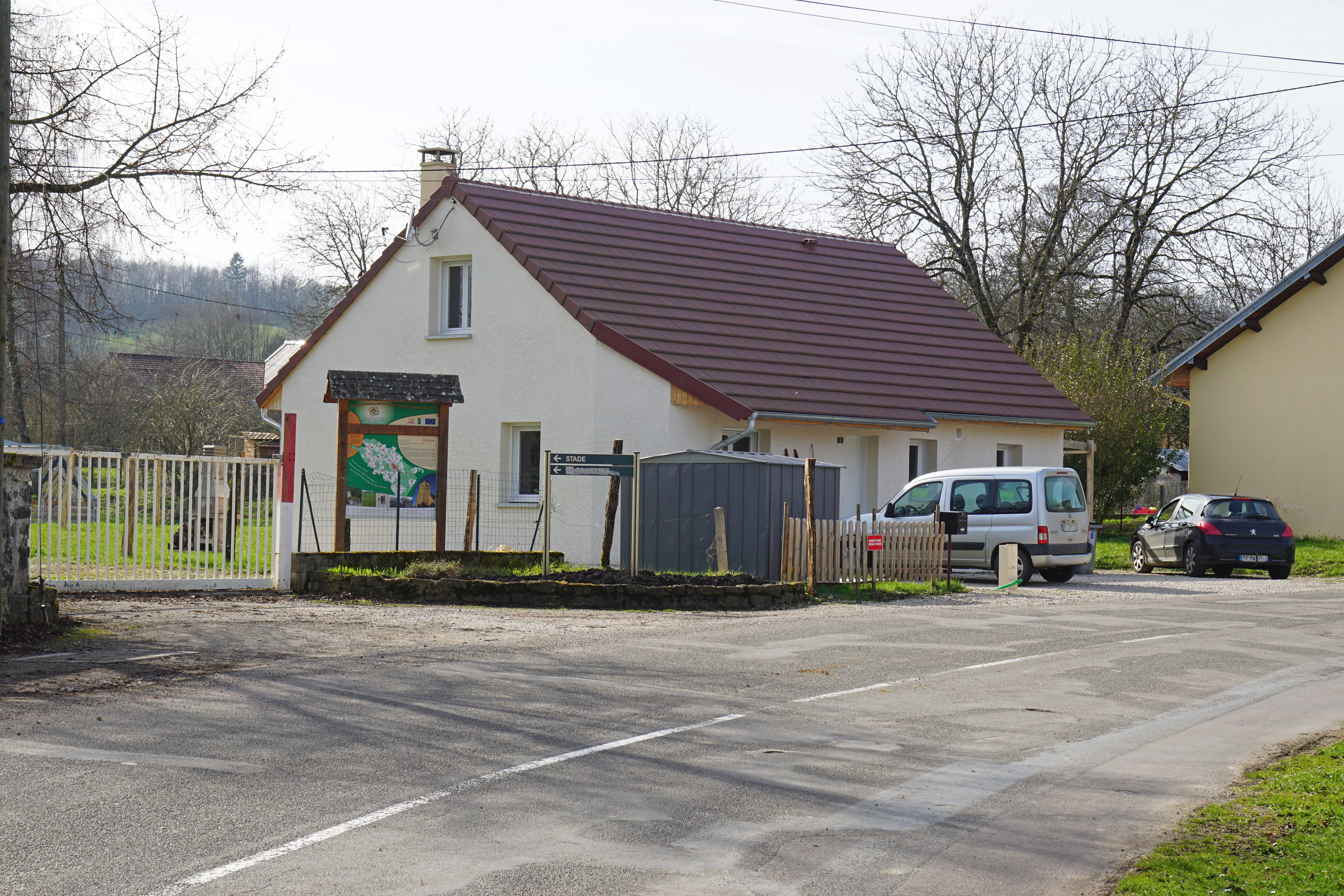 Sous ce pavillon se trouve les ruines de l'ancienne saline de Grozon datée du Haut Moyen Age.